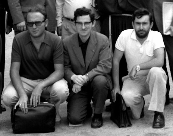 Joseba Intxausti erdian . Lizundia eta Kintanaren artean. Euskaltzaindia Arantzazu 1972-7-29